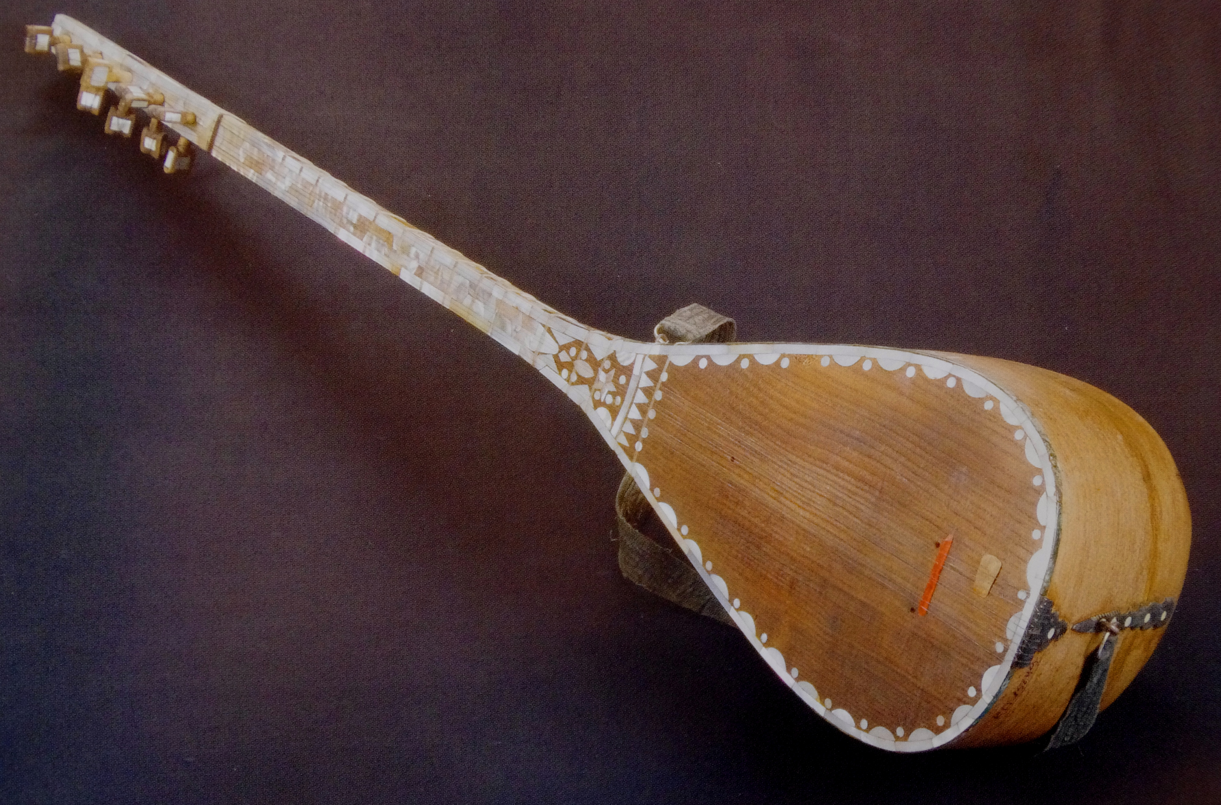 Azərbaycan milli musiqi aləti saz